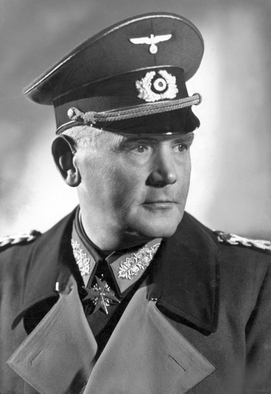 Zentralbild Generalfeldmarschall Werner von Blomberg, geb. 2.9.1878 in Stargard (Pommern) gest.: 14.3.1946 in Nürnberg, von 1935 Kriegsminister und Oberbefehlshaber der Wehrmacht, wurde 1938 ausgeschaltet. Aufnahme 1937 3303-37 [Scherl Bilderdienst]